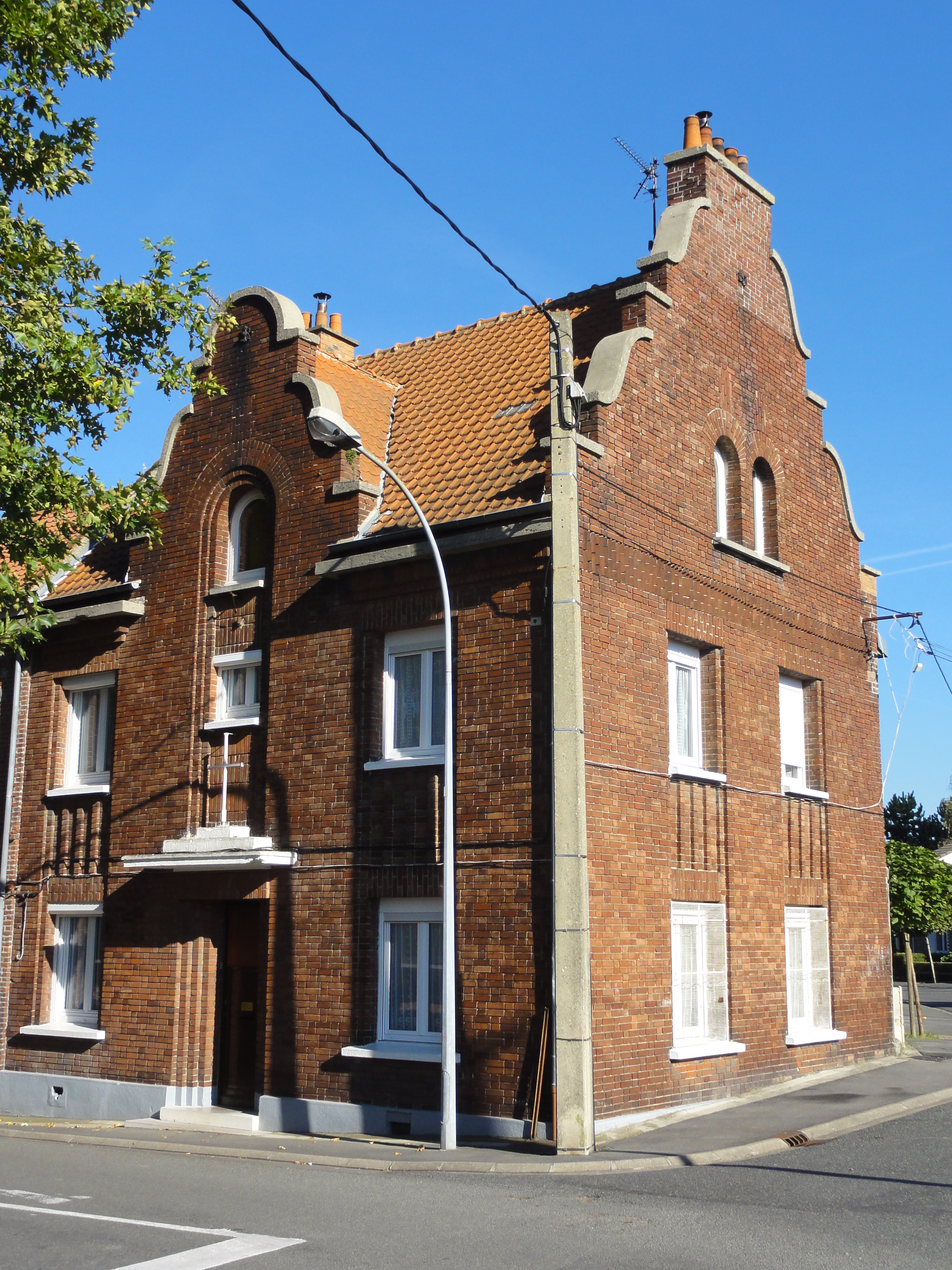 Presbytère polonais de l'église Saint-Louis des cités de la Fosse n° 2 de la Compagnie des mines de Drocourt, Rouvroy, Pas-de-Calais, Nord-Pas-de-Calais, France. .